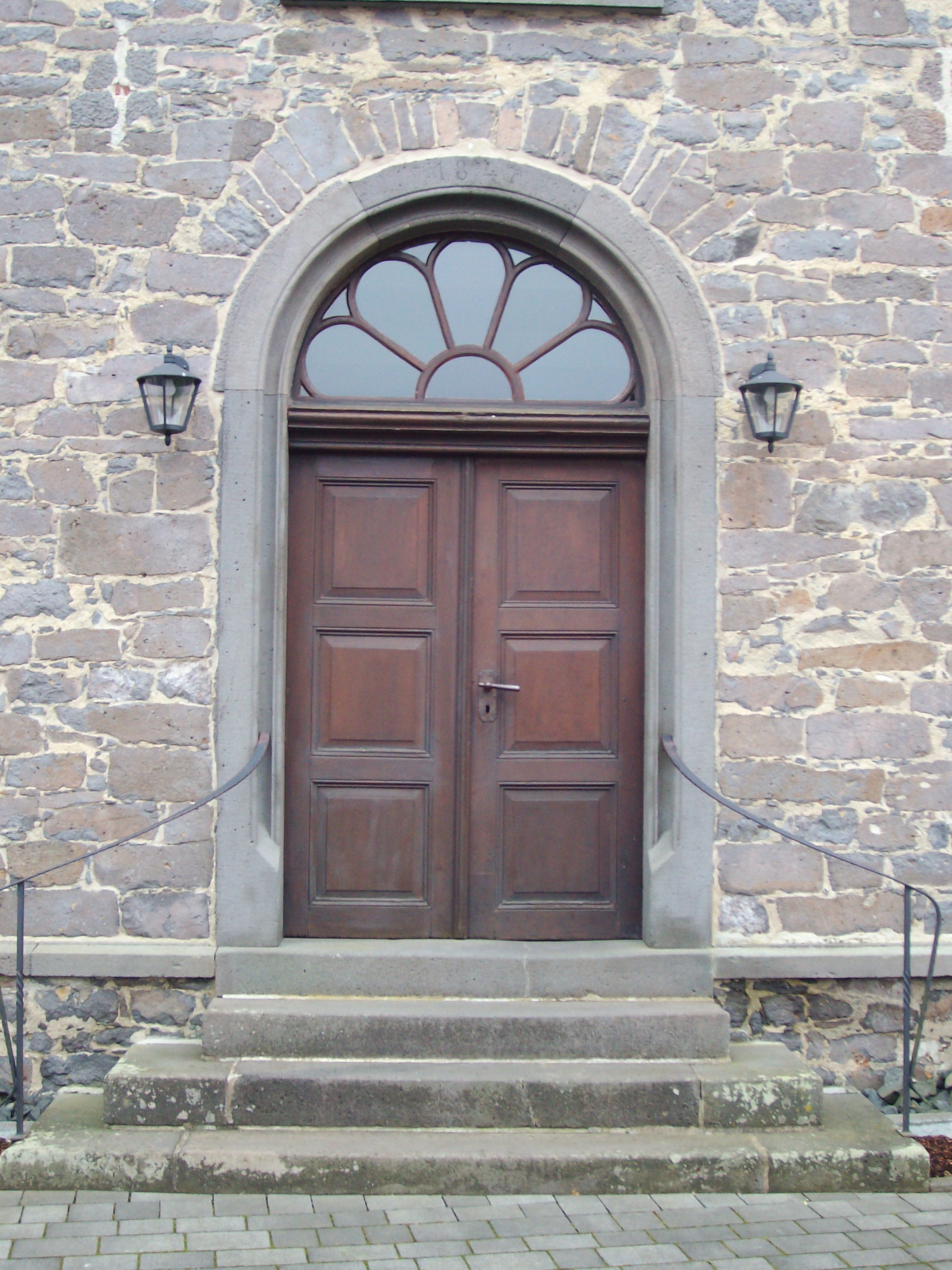 Evangelische Kirche Lumda, Grünberg, Landkreis Gießen, Hessen, Deutschland